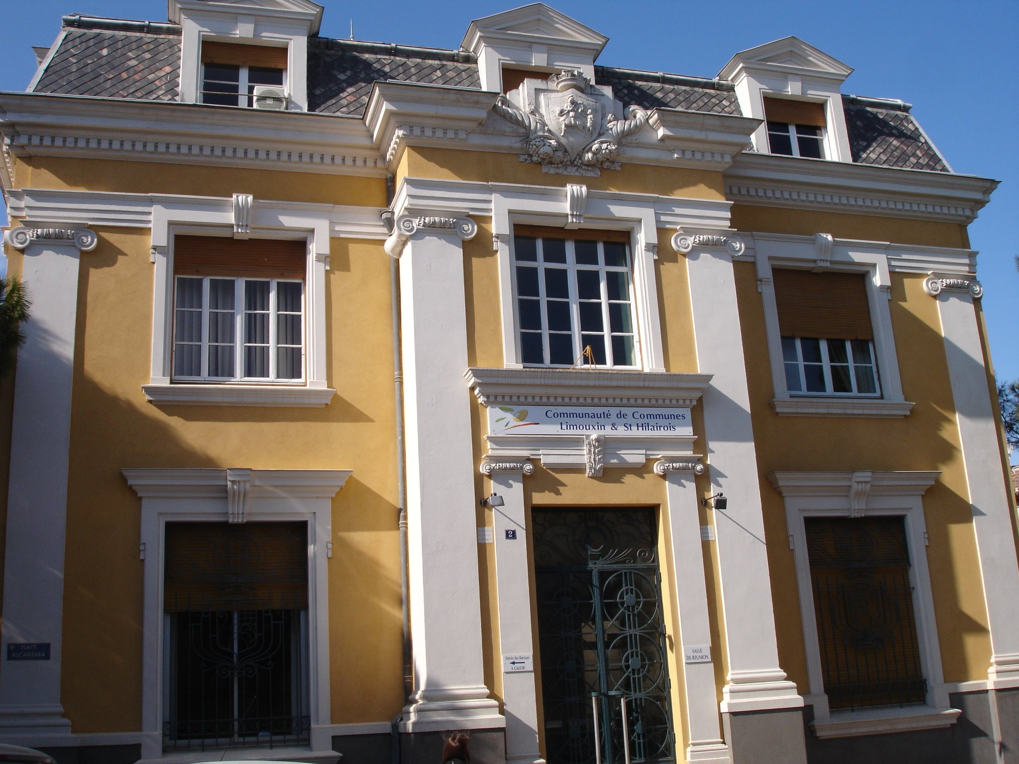 Siège de la communauté de commune du Limouxin et Saint-hilairois à Limoux (Aude, France).